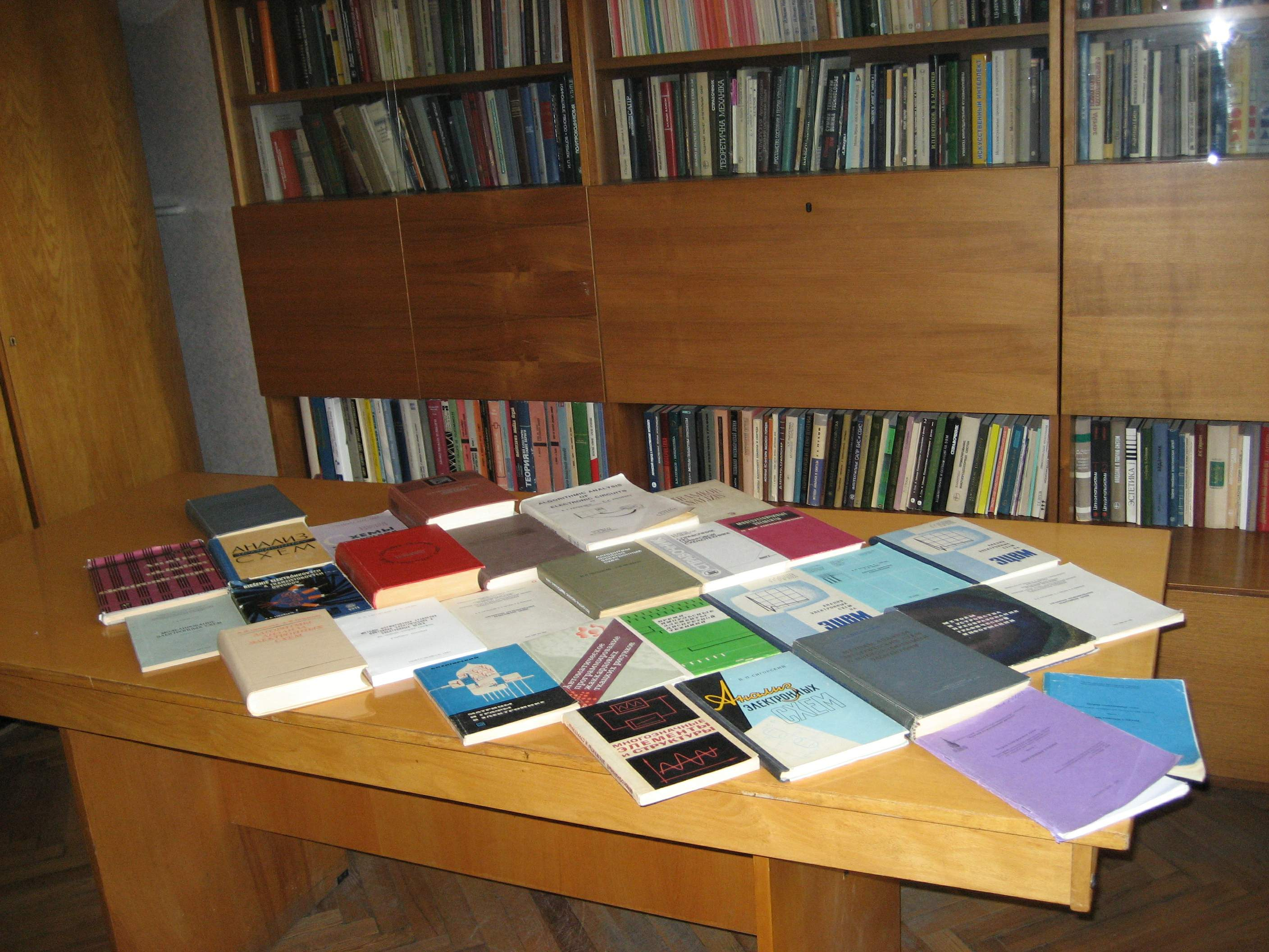 Монографії В.П. Сігорського